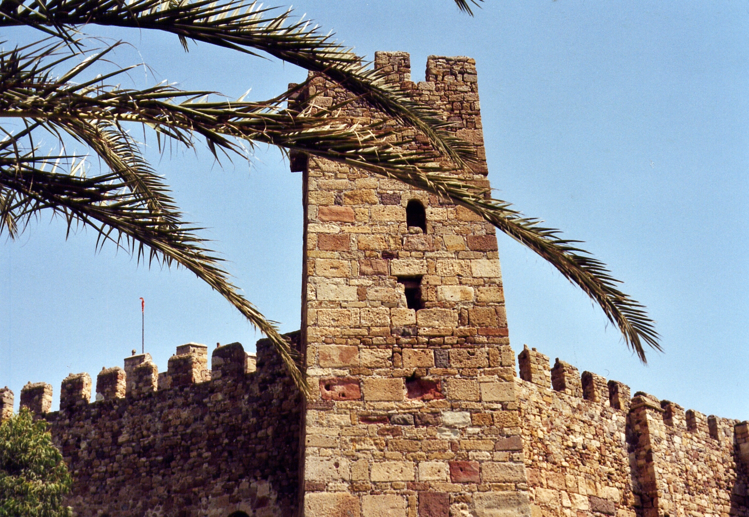 Genuesische Festung Candarli, türkische Westküste